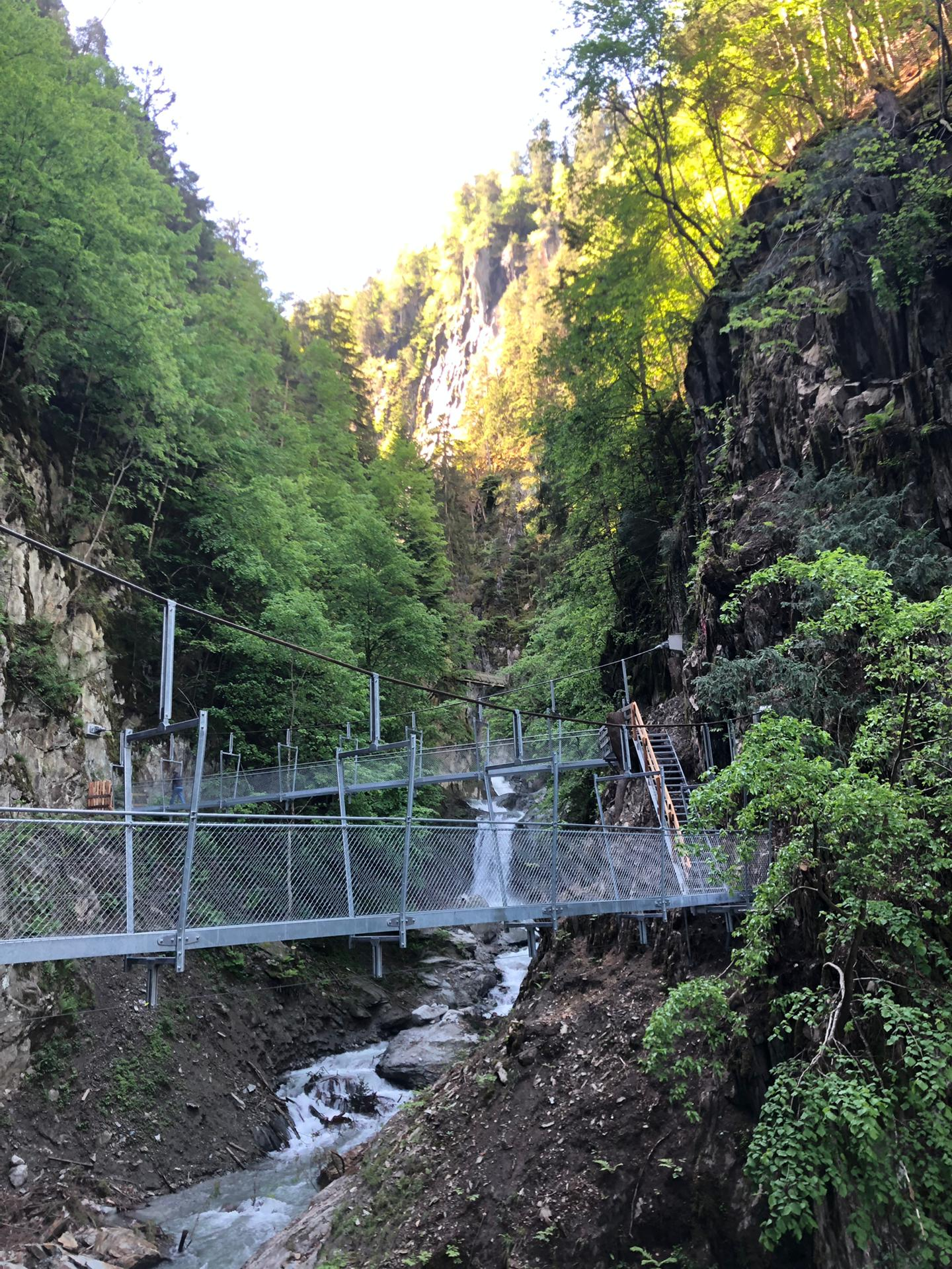 Nouvelles passerelles métalliques installées en 2019 dans les Gorges du Durnand - Suisse - Valais - Bovernier